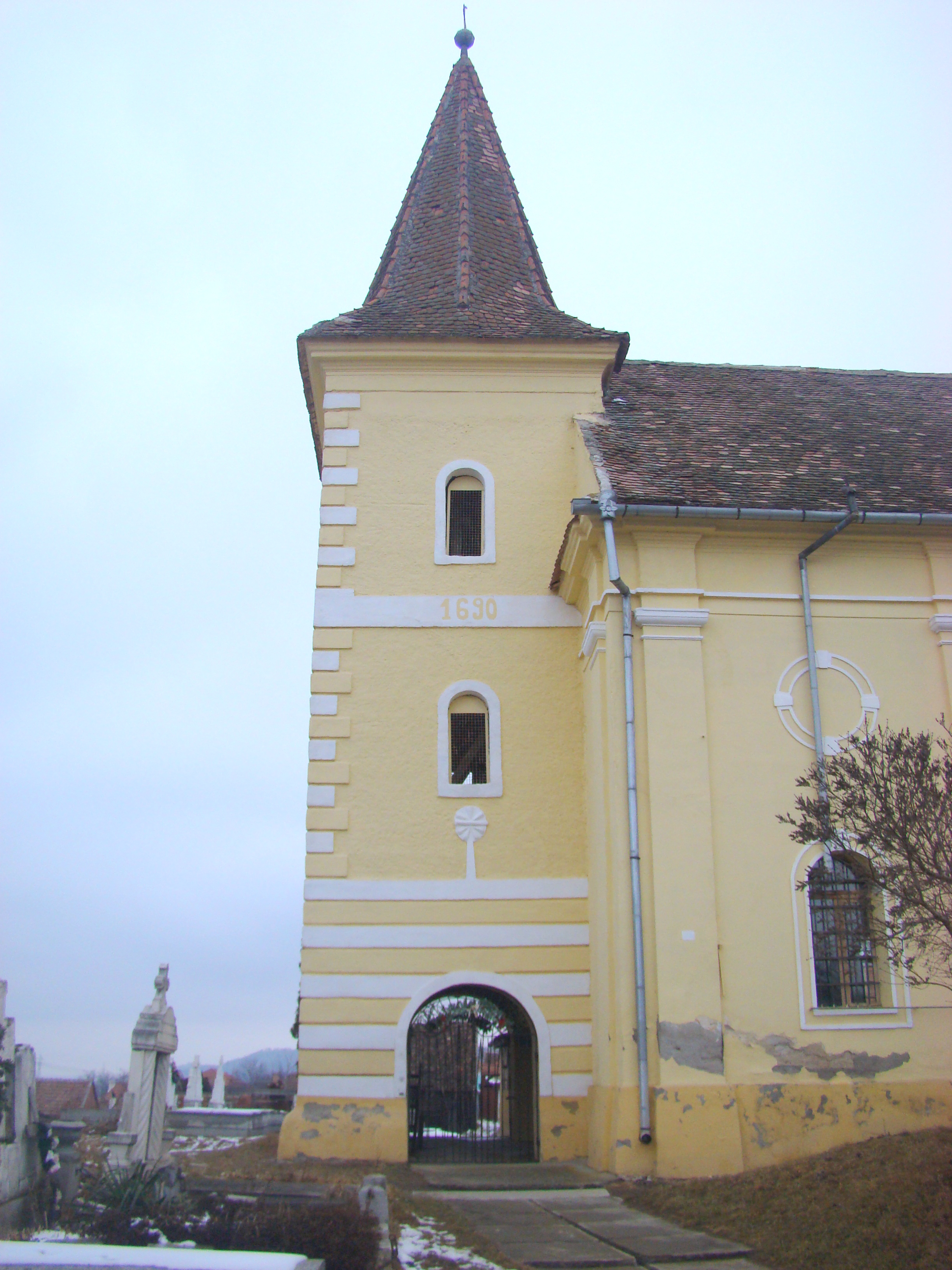 Biserica "Sfânta Maria" din Bungard, județul Sibiu 01